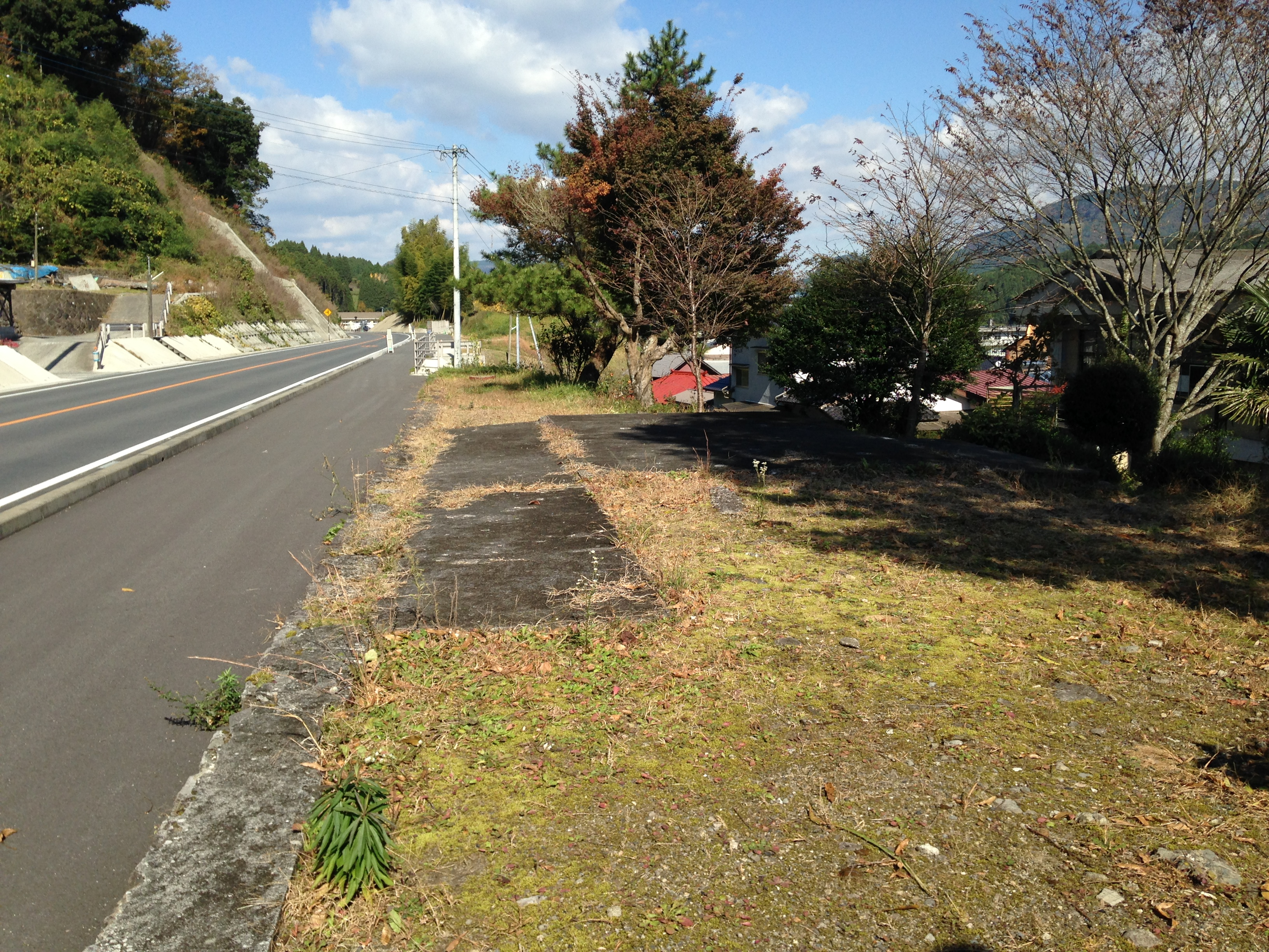 旧・町田駅のホーム跡